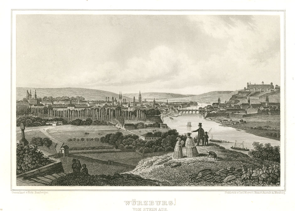 Würzburg, vom Stein aus. Stahlstich nach Vorzeichnung von Fritz Bamberger, 1847, aus: Ludwig Braunfels; Die Mainufer und ihre nächsten Umgebungen. Verlag Carl Etlinger, Würzburg 1847. Gedruckt in der Kunstanstalt von Carl Mayer, Nürnberg.